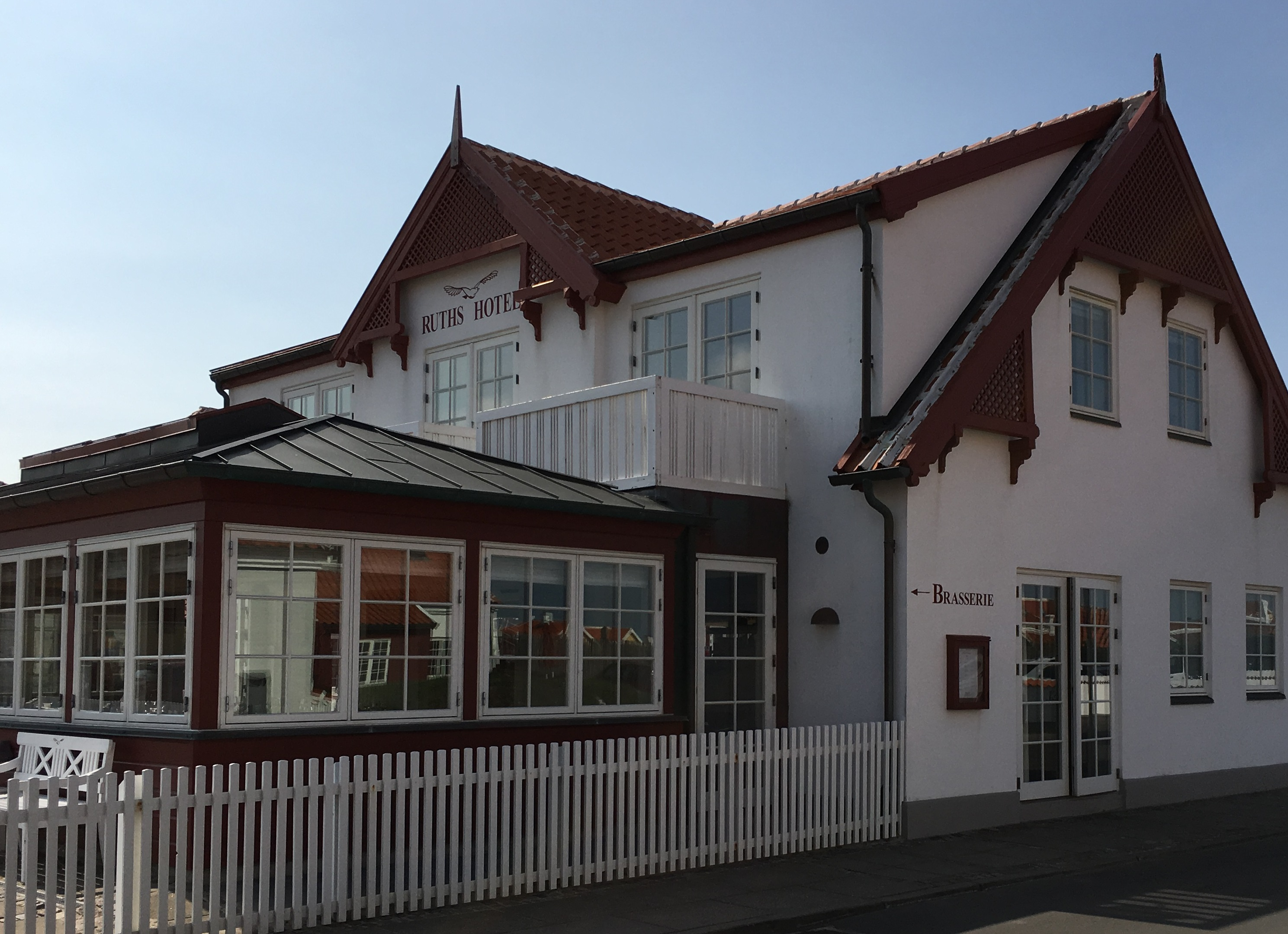 Ruths Hotel i Gammel Skagen